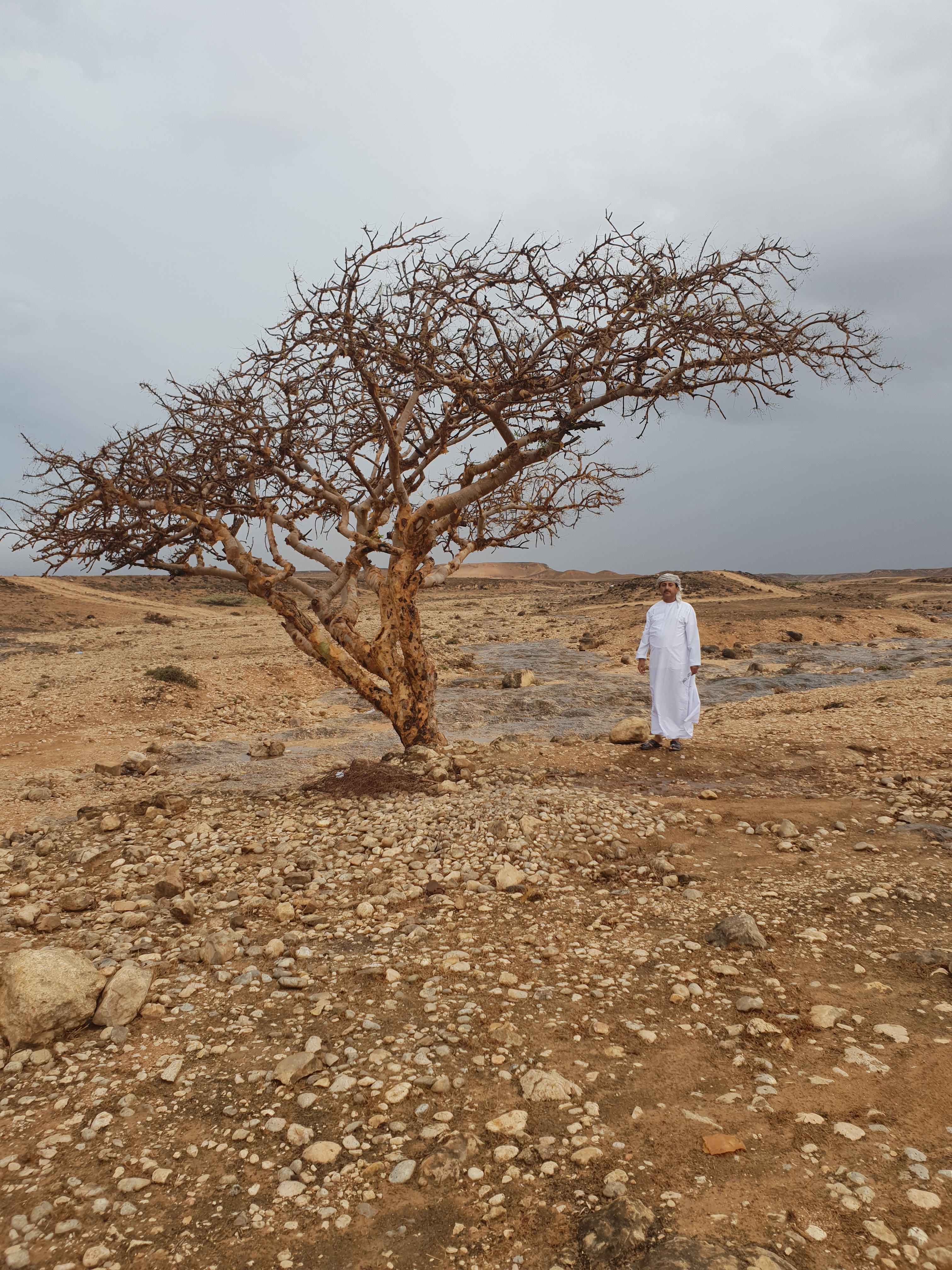 Weihrauchbaum Boswellia Sacra aus dem Oman